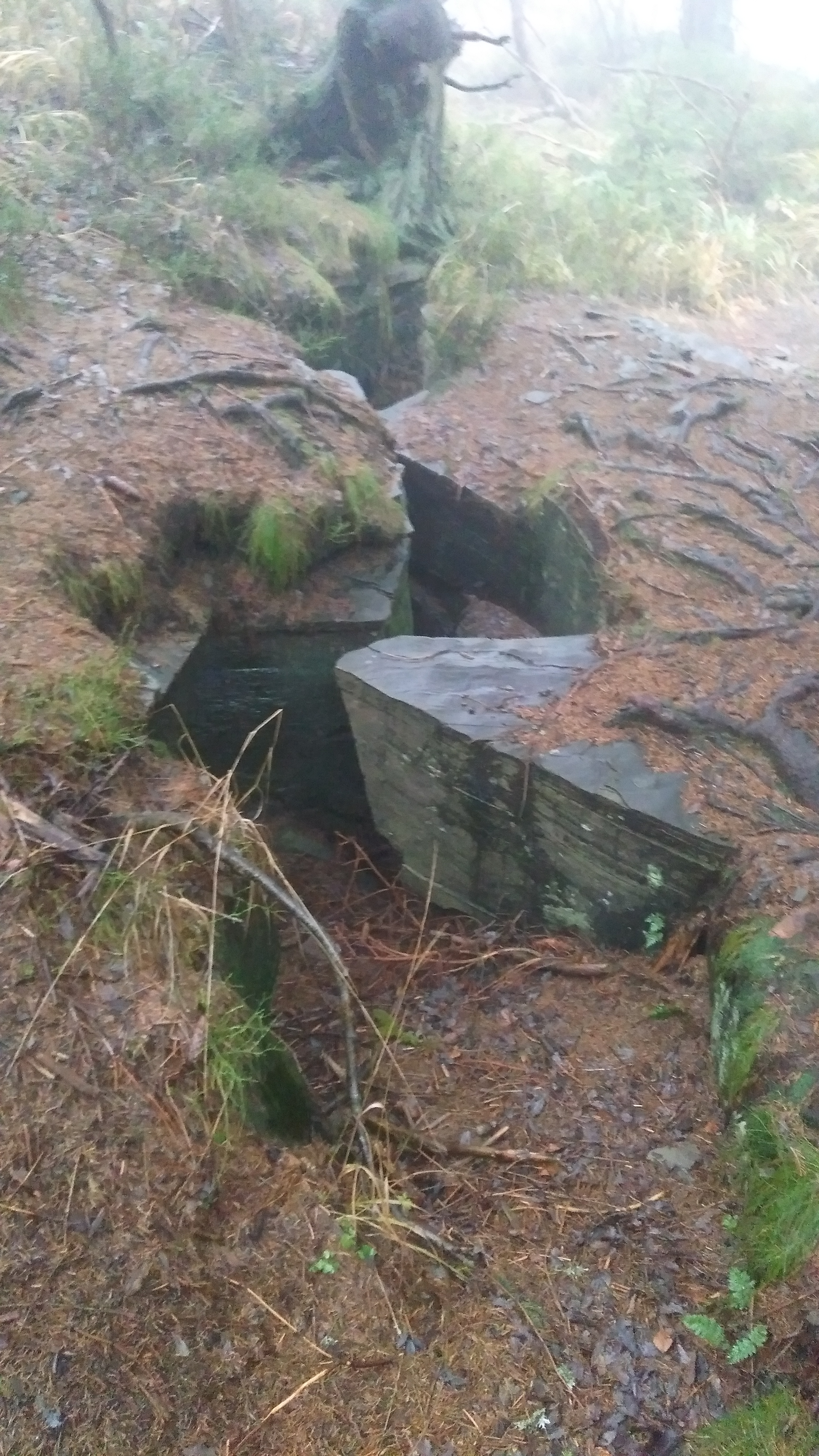 Rozsedlina na Čertově mlýně způsobena gravitačním posunem pískovcových bloků